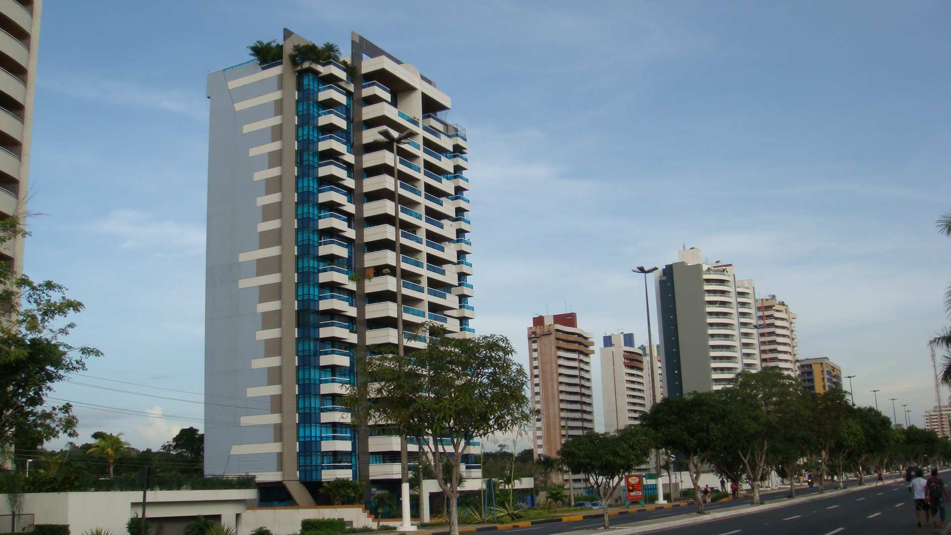 Prédios da Ponta Negra